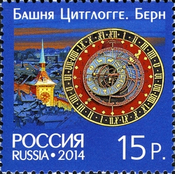 Совместный выпуск Российской Федерации и Швейцарской Конфедерации. Архитектура. Башенные часы